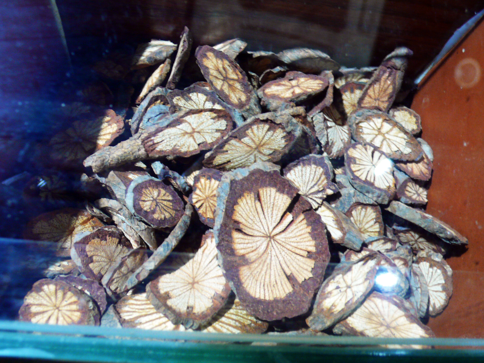 大血藤饮片。